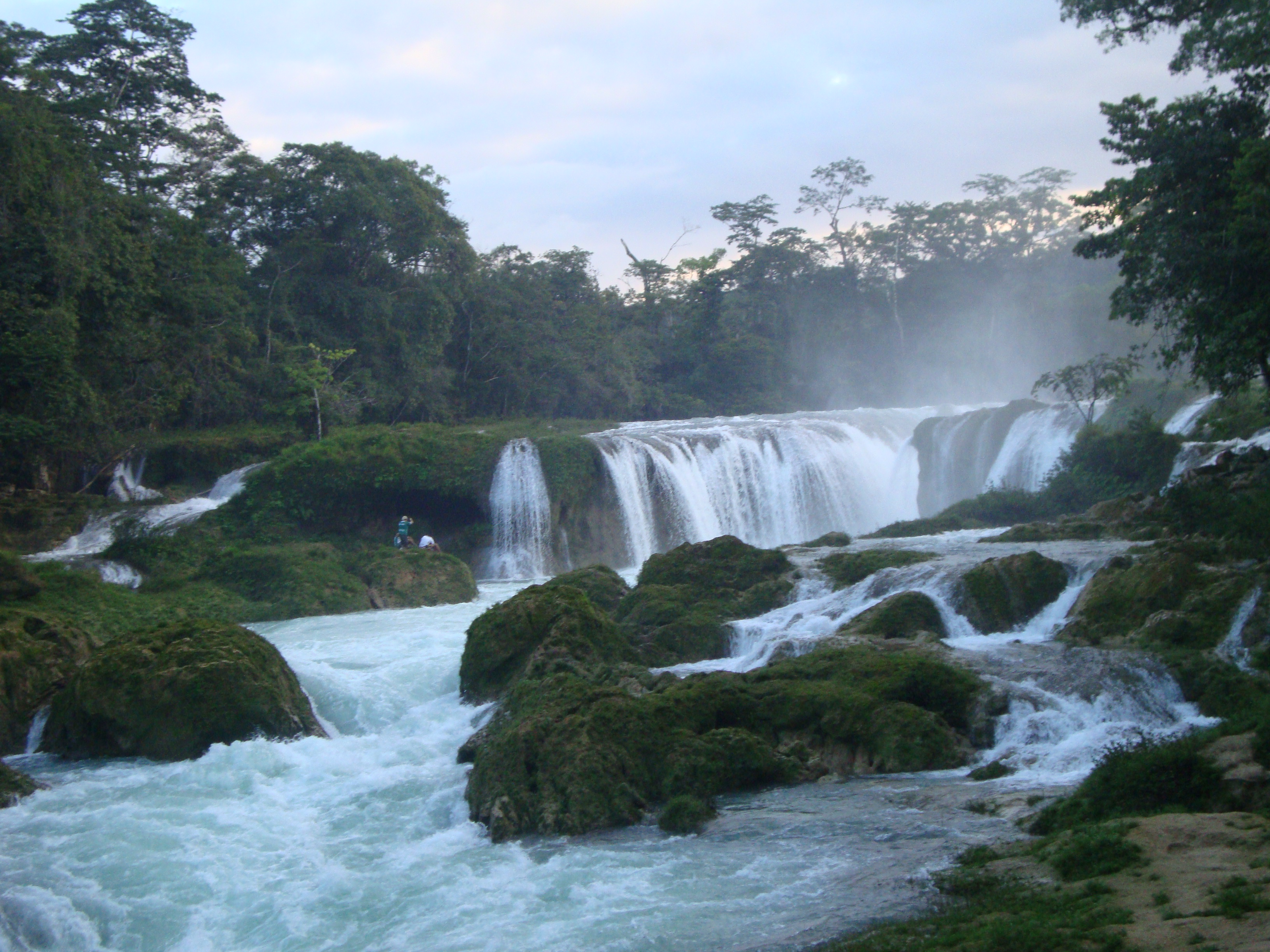 Causas Verdes Las Nubes